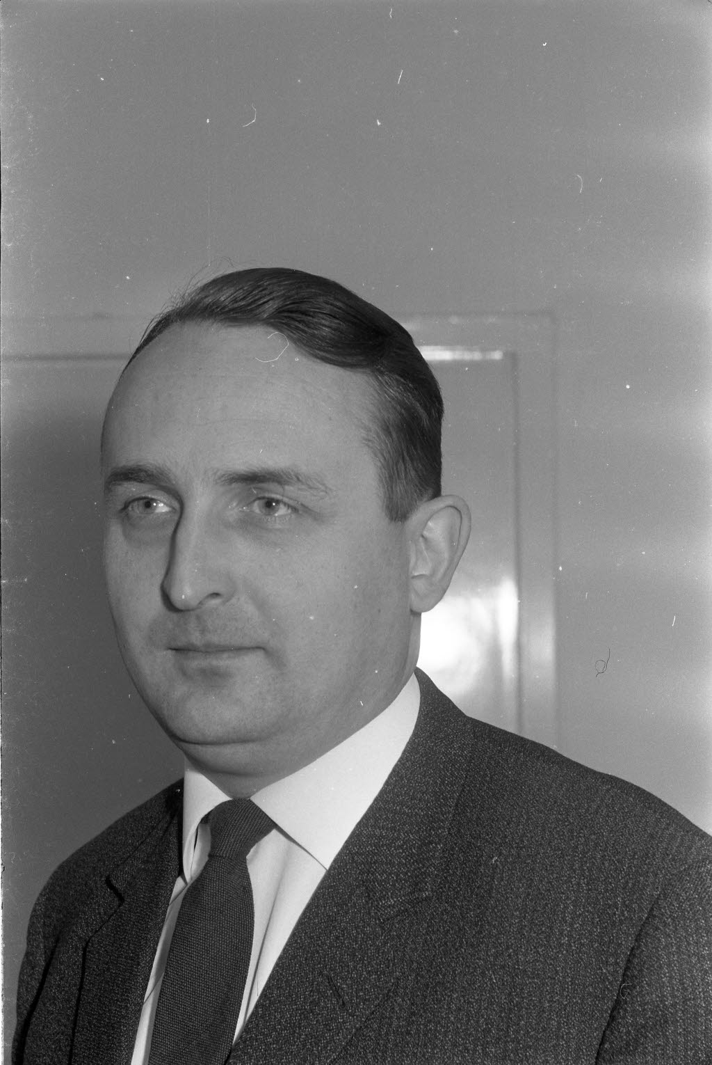 Privatdozent für Bodenkunde, und Pflanzenernährung am Institut für Pflanzenernährung und Bodenkunde der Landwirtschaftliche Fakultät an der Christian-Albrechts-Universität (CAU) und Referent der Kieler Universitätstage 1964 zum Thema "Aufgaben der Agrikulturchemie in den Tropen".